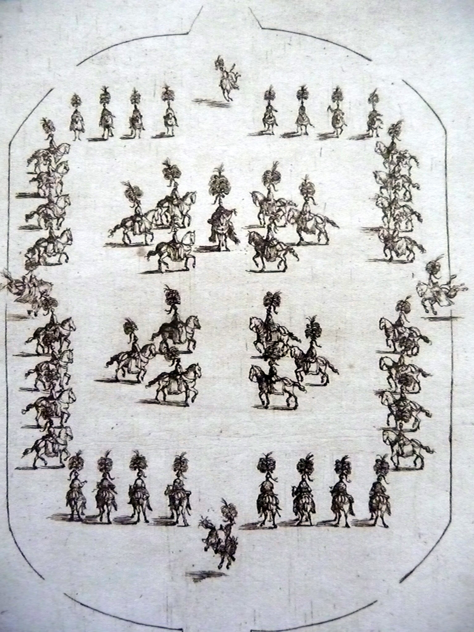 Plumeaus, Buschen aus meist eingefärbten Straußenfedern, zierten in der Zeit des Barock nicht nur Bettpfosten und Pferdegeschirre, sondern auch die Helme der Reiter beim Pferdebalett.